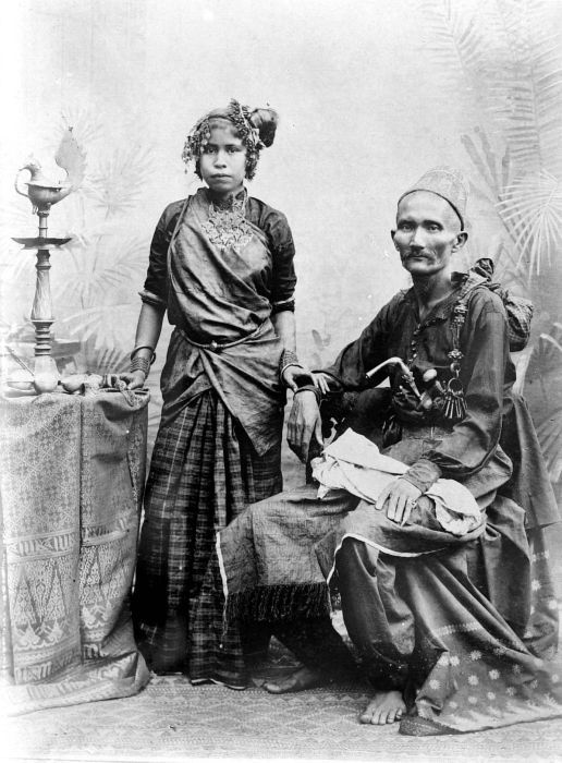 Negatief. Echtpaar in traditionele feesttooi; de vrouw is de vroeger beroemde "Roos van Padang Tidji", de man het hoofd van die plaats